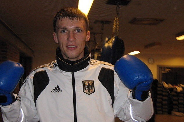 Eugen Burhard Dänemark 2009 Vorbeireitung zur EU-Cup